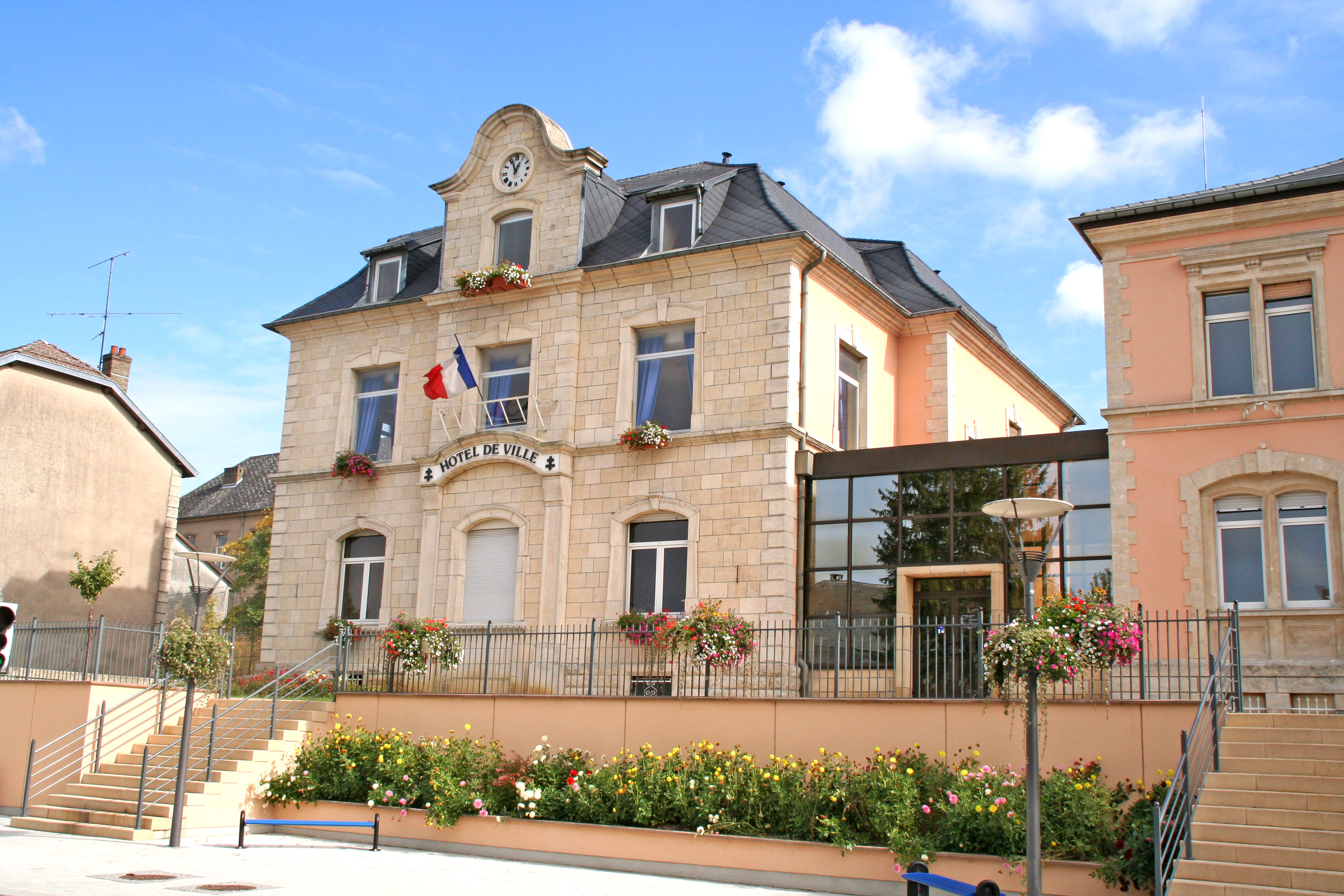 Däitsch-Oth Gemeng.